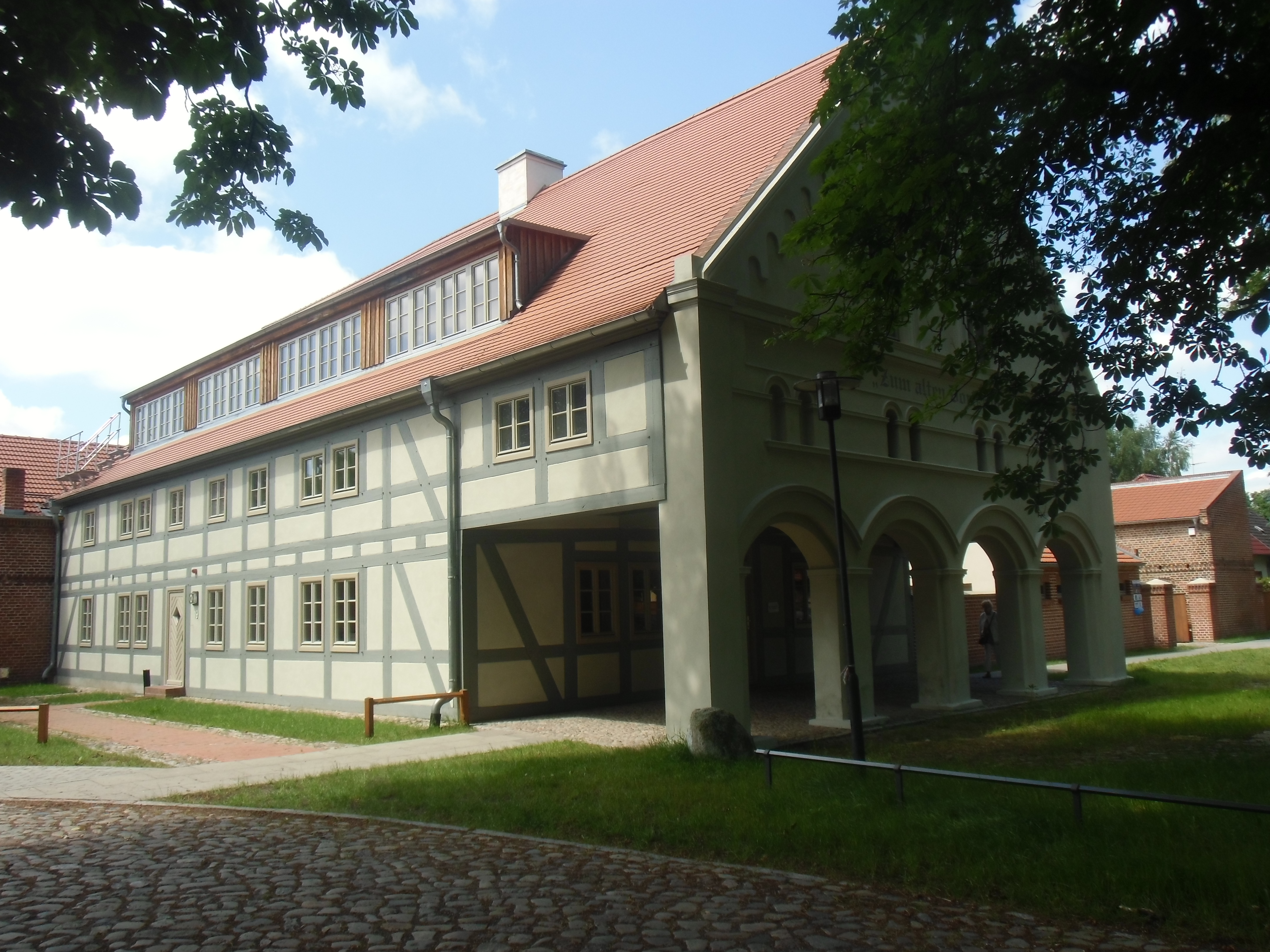 Denkmalgeschütztes Vorlaubenhaus an der Dorfstraße in Staffelde, Ortsteil von Kremmen, ehemaliger "Alter Dorfkrug Staffelde"